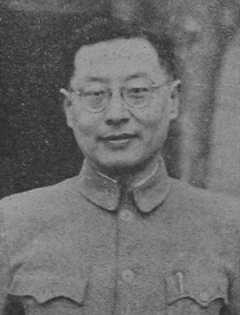 中國人民政治協商會議第一屆全體會議代表